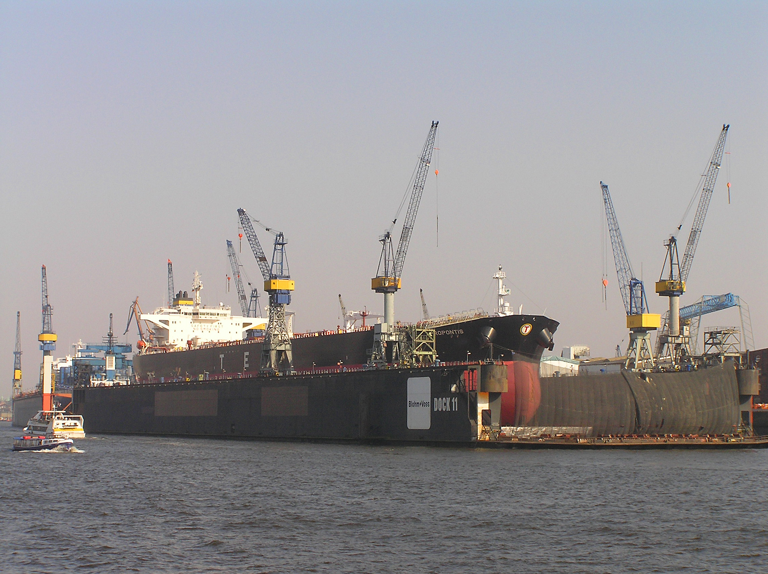 Greek tanker ship Propontis in dry dock in Hamburg. Propontis is a 250-metre vessel with 28-men crew. Ship was damaged in Gulf of Finland 12 of February 2007. Grecki tankowiec Propontis w suchym doku w Hamburgu. Propontis ma 250m długości i obsługę złożoną z 25 marynarzy. Statek został uszkodzony 12 lutego 2007r na skałach Zatoki Fińskiej